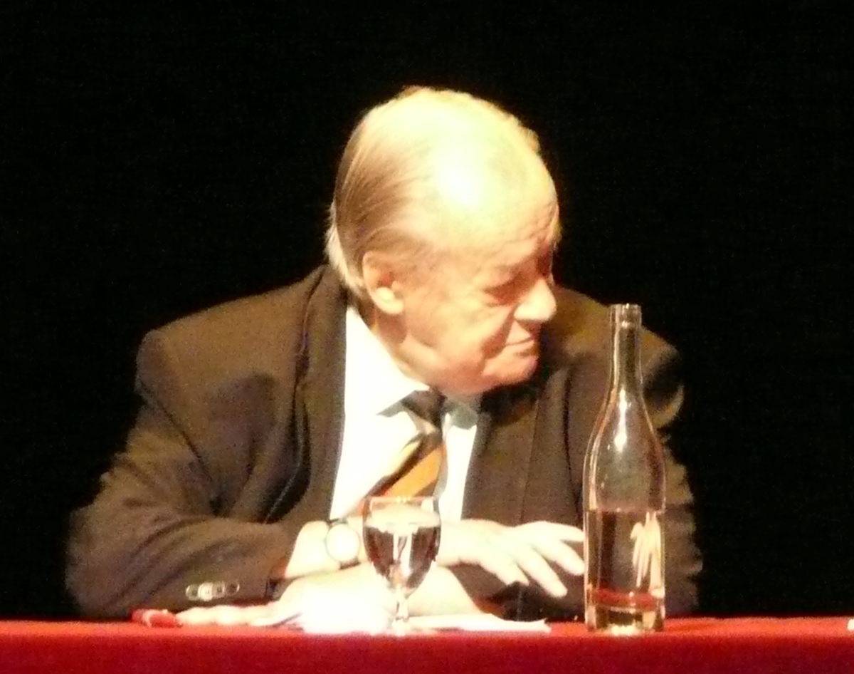 Le sénateur Jack Ralite, avant de prendre la parole pour sa conférence intitulée « Travail et dignité », donnée au Théâtre de la Commune, à Aubervilliers (France), le 6 juin 2011, en clôture des cinq années du cycle des Lundis du Collège de France à Aubervilliers.